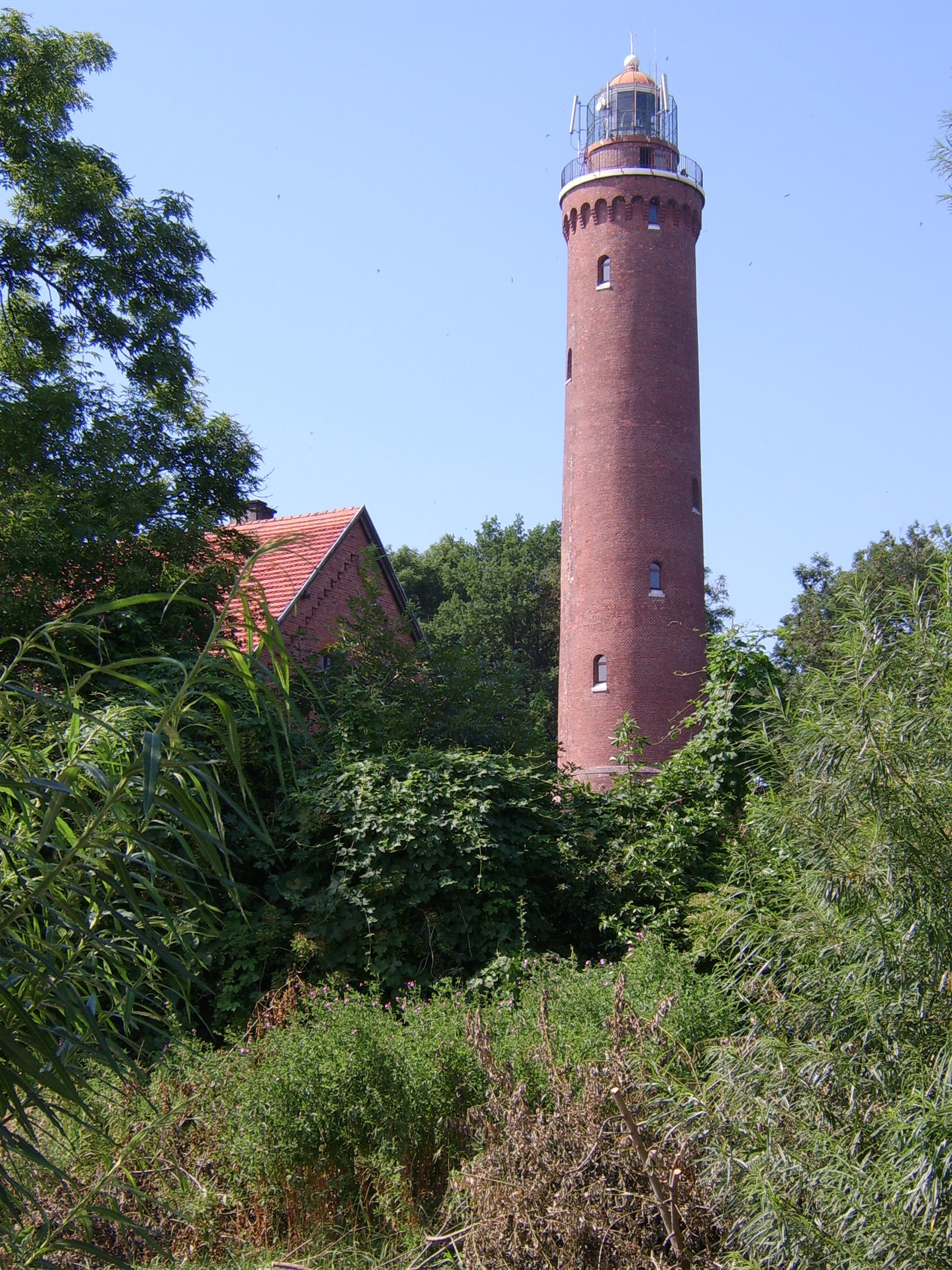 Latarnia w Gąskach